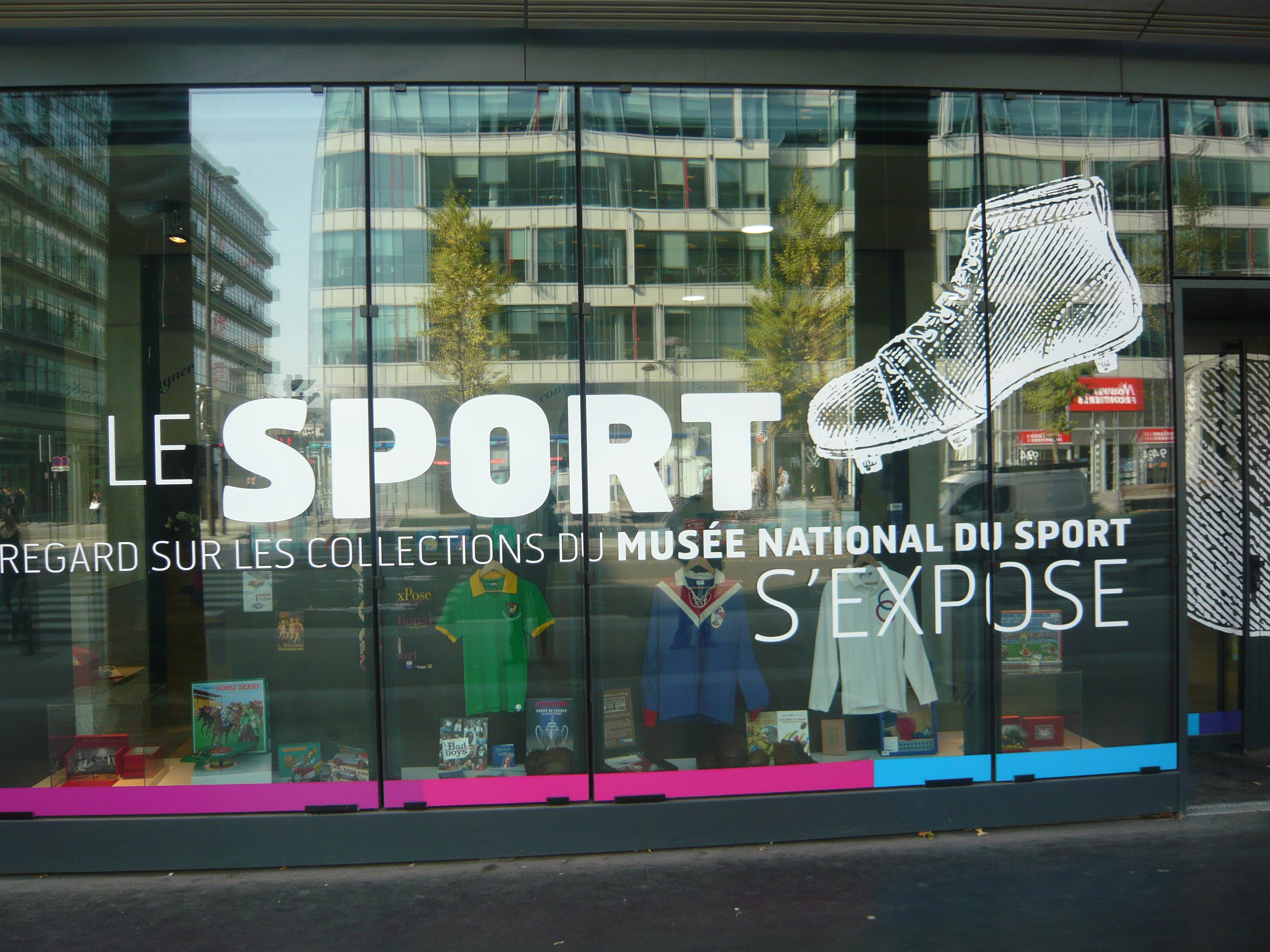 Vitrine du Musée national du sport au 93 avenue de France dans le 13e arrondissement de Paris.